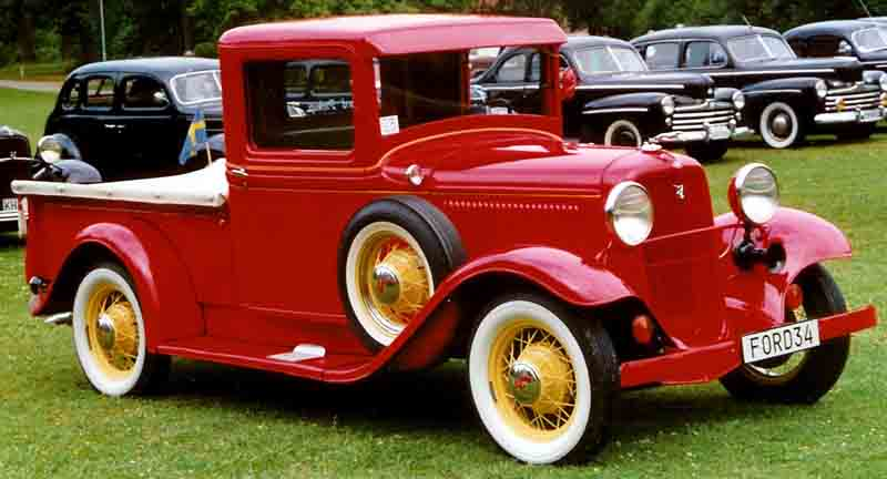 Ford Model 46 Pickup 1934